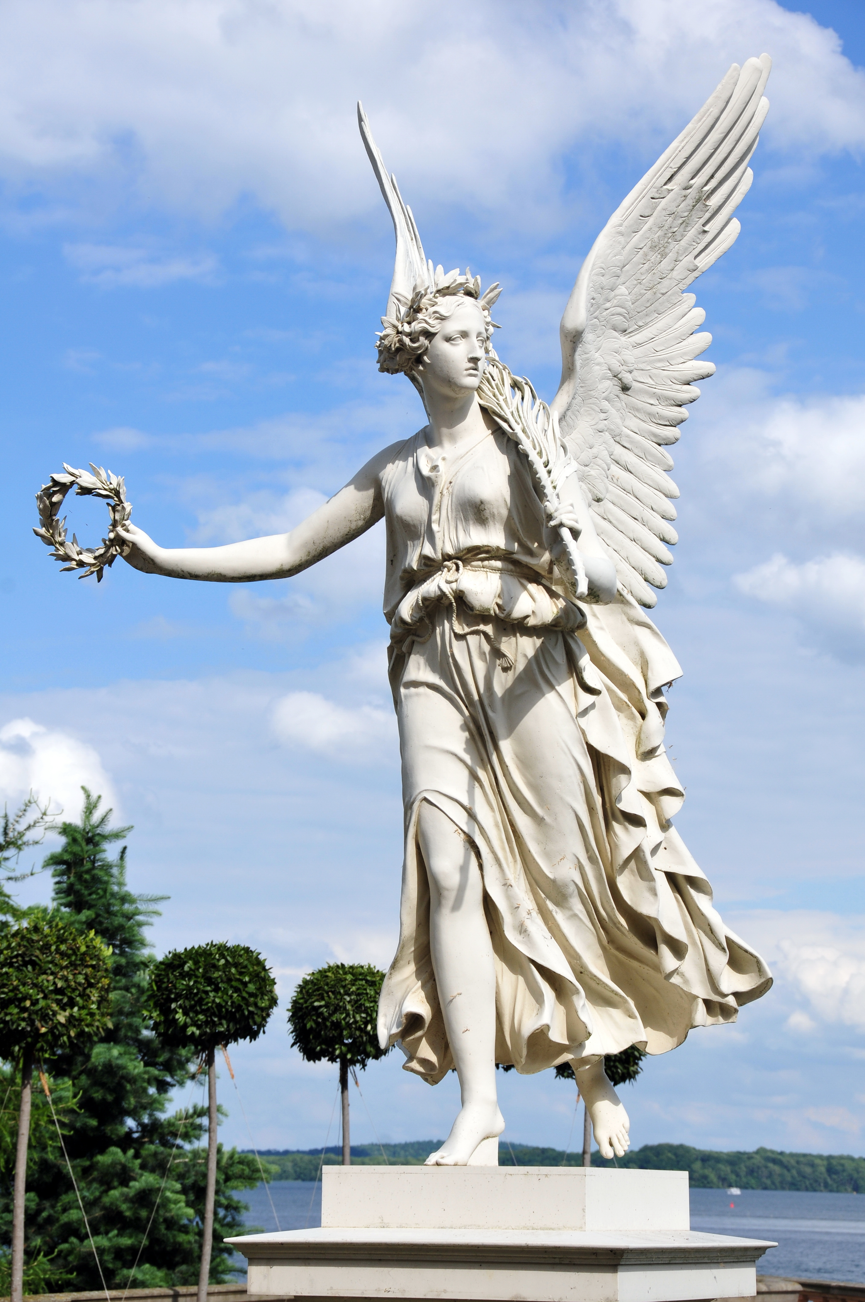 Schwerin; mit 50mm Brennweite von der Orangerie zum Bahnhof Viktoriastatue auf dem Dach der Orangerie